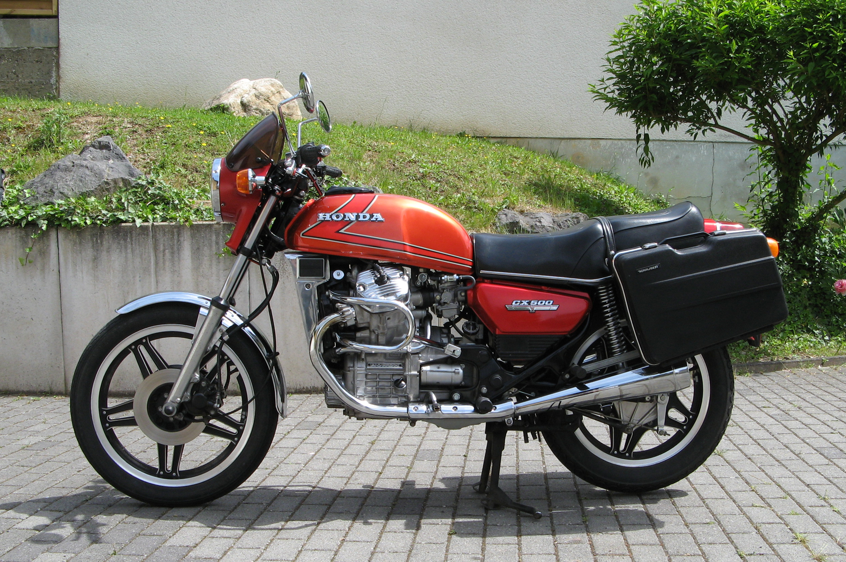 HONDA CX 500 B, 1981, 37 kW, Germany